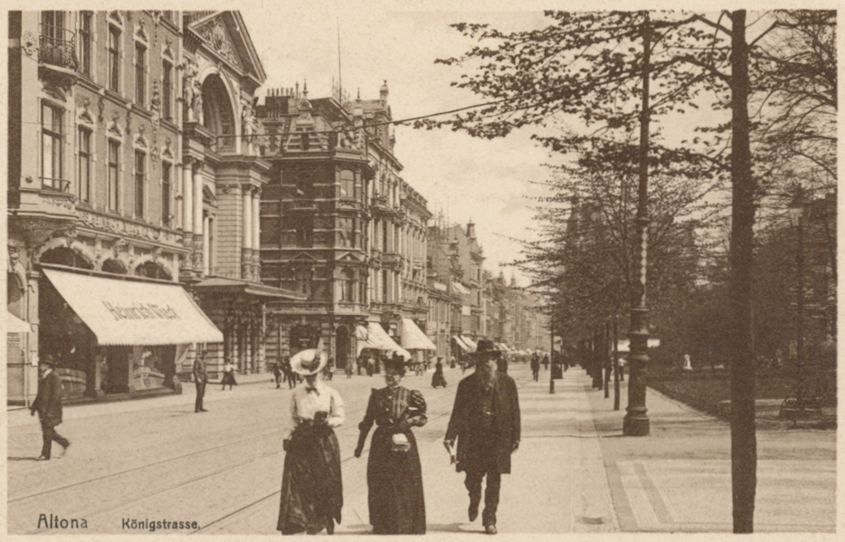 Hamburg, Altona, Königstraße